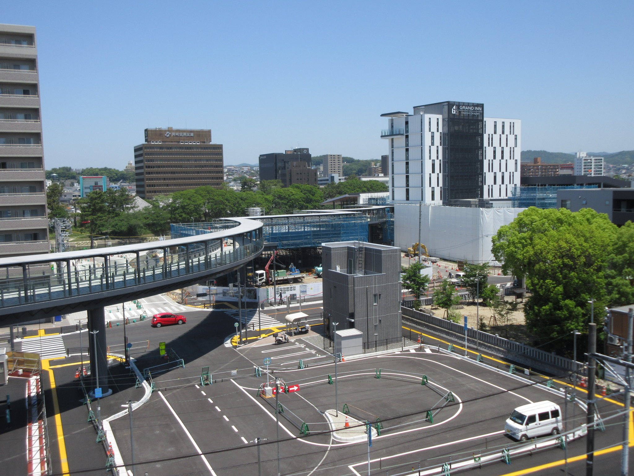 岡崎市上明大寺町、明大寺町上郷中（2019年5月撮影）